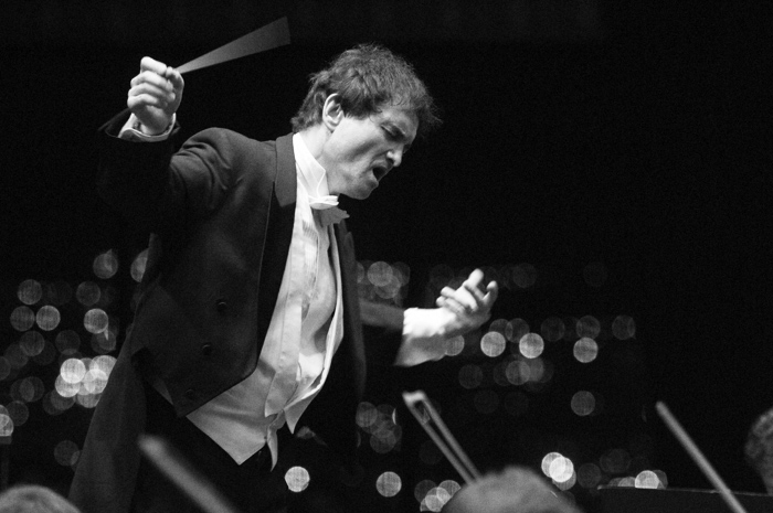 Jorge Uliarte/Orquesta Sinfónica de Moscú, edición 2009 del Festival de Ushuaia.